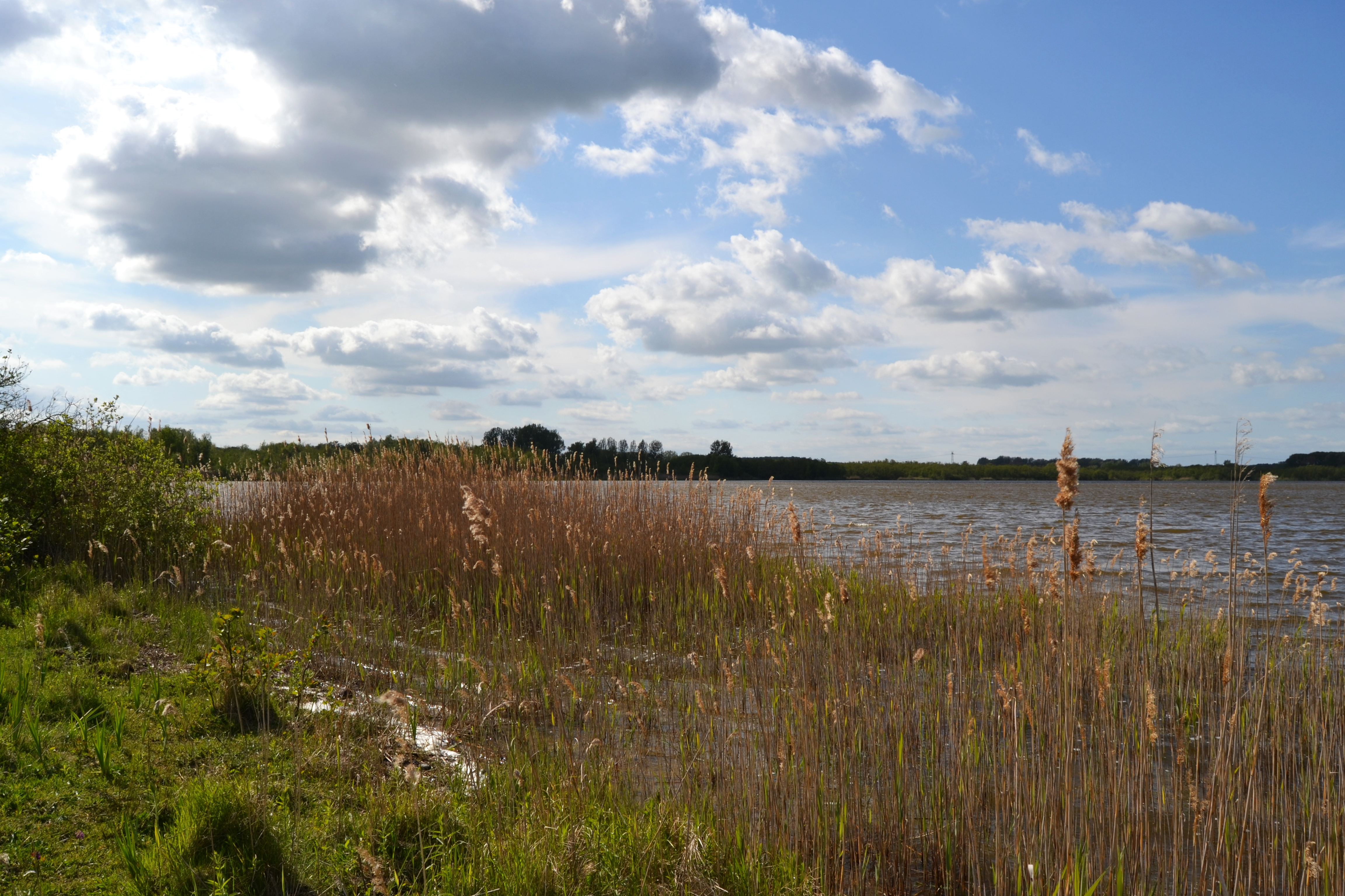 NSG Santower See (Südufer)